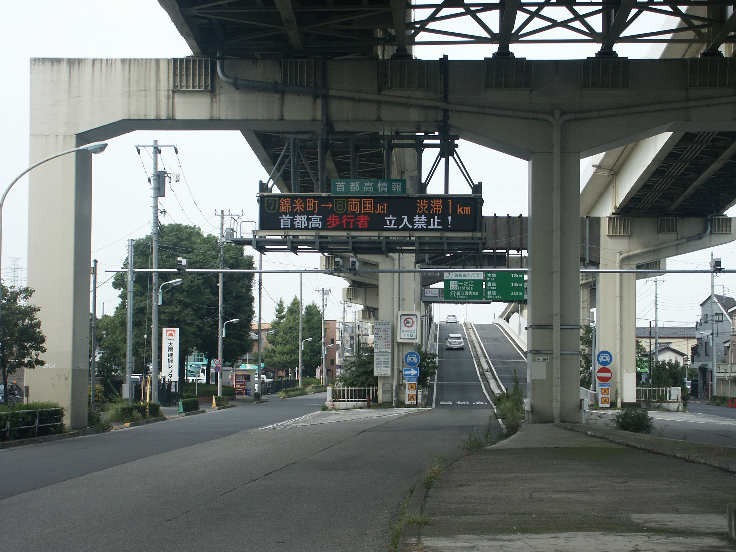 首都高速7号小松川線一之江入口付近